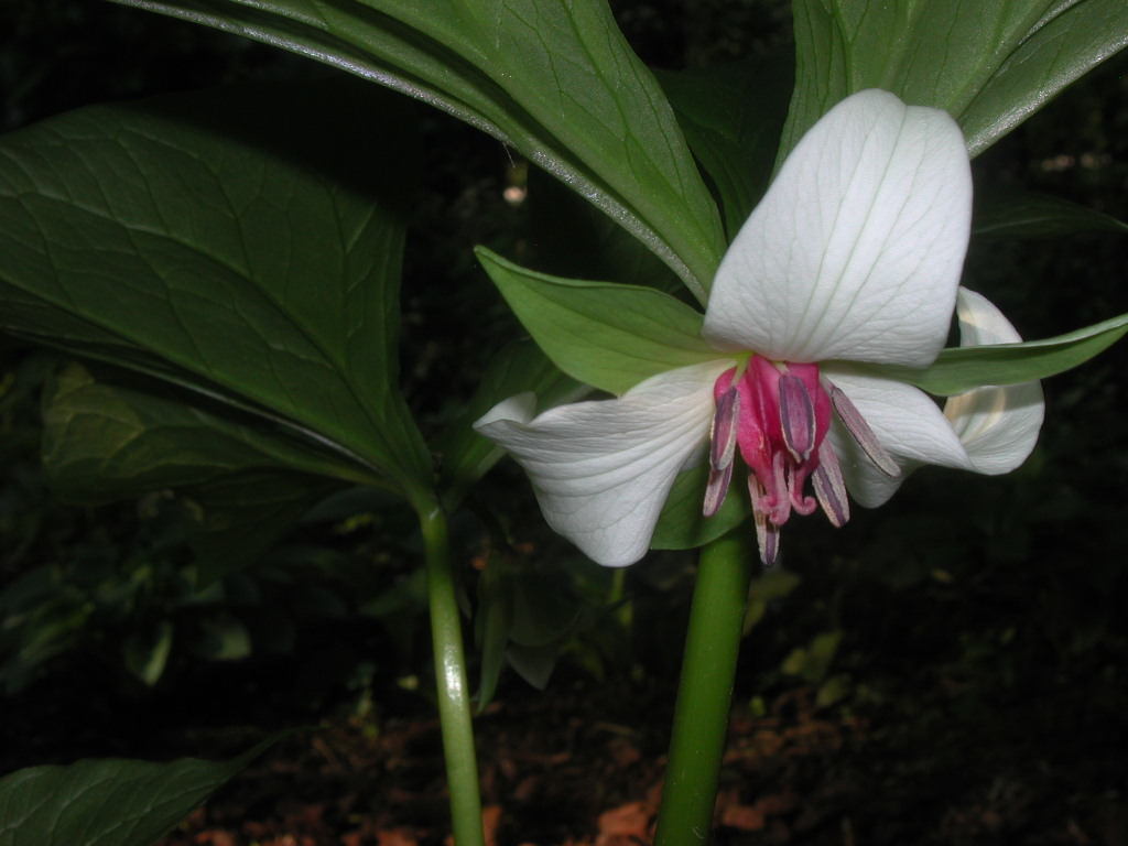 Trillium rugelli